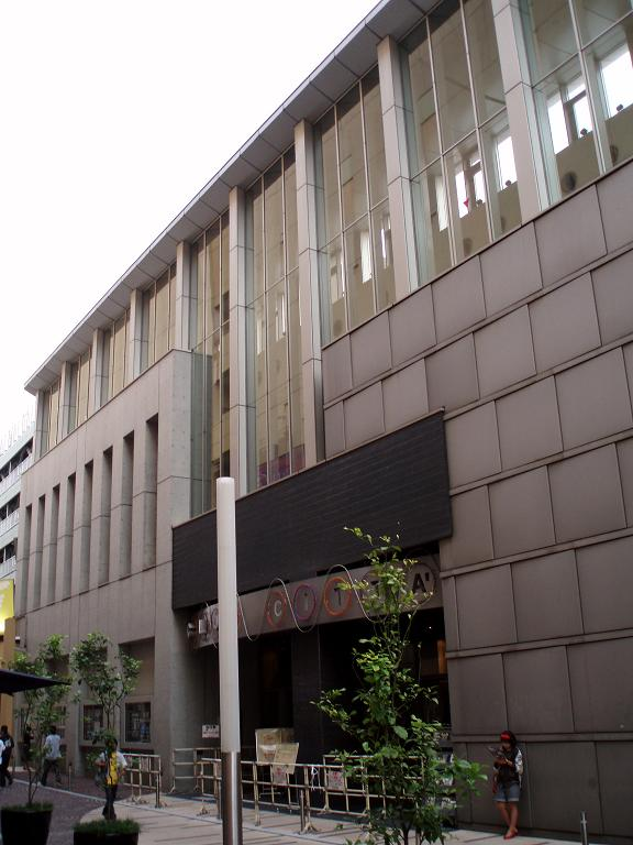 CLUB CITTA'(クラブチッタ) 2006年9月30日 投稿者撮影